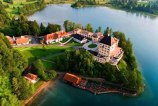 Luftbild Schloss Fuschl